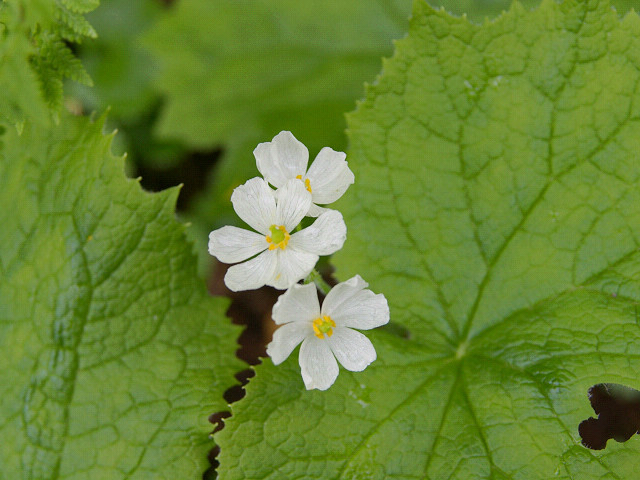 サンカヨウ（北海道富良野岳で撮影)Diphylleia grayi (Mt. Furano, Hokkaido, JAPAN)